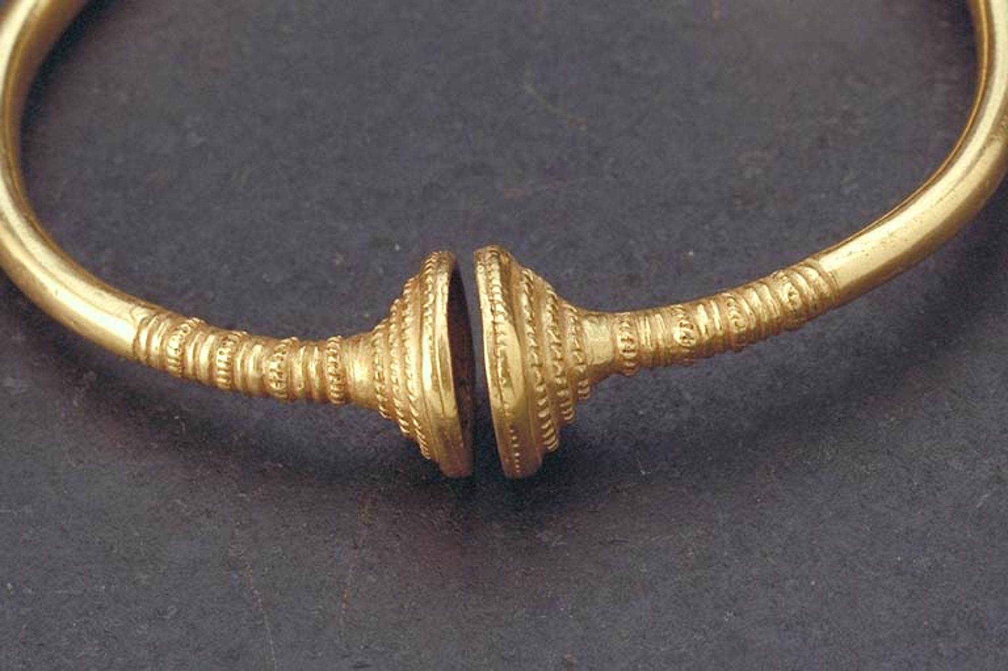 Edsring är en en armring som markerar att en ed ingåtts mellan parter inför en gode eller hövding. Ringen är daterad till bronsåldern period V (900 - 600 f.Kr.), gjord i guld och väger 76g.